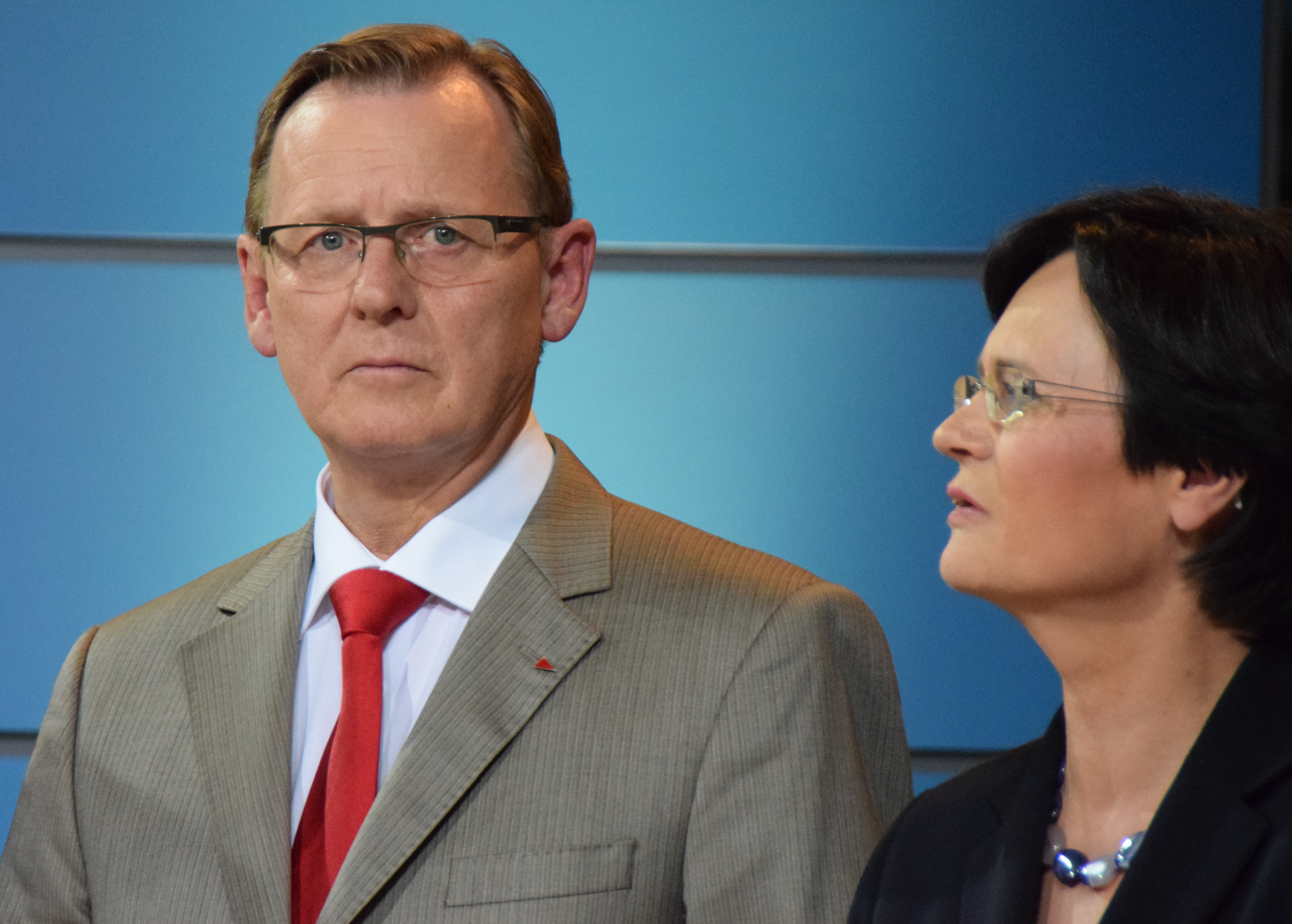 Landtagswahl Thüringen am 14. September 2014